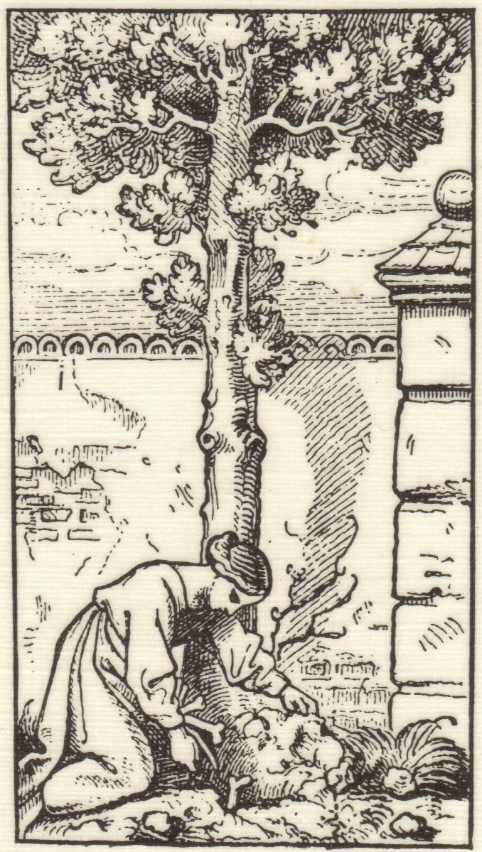 original printed in Münchener Bilderbogen Nr. 179